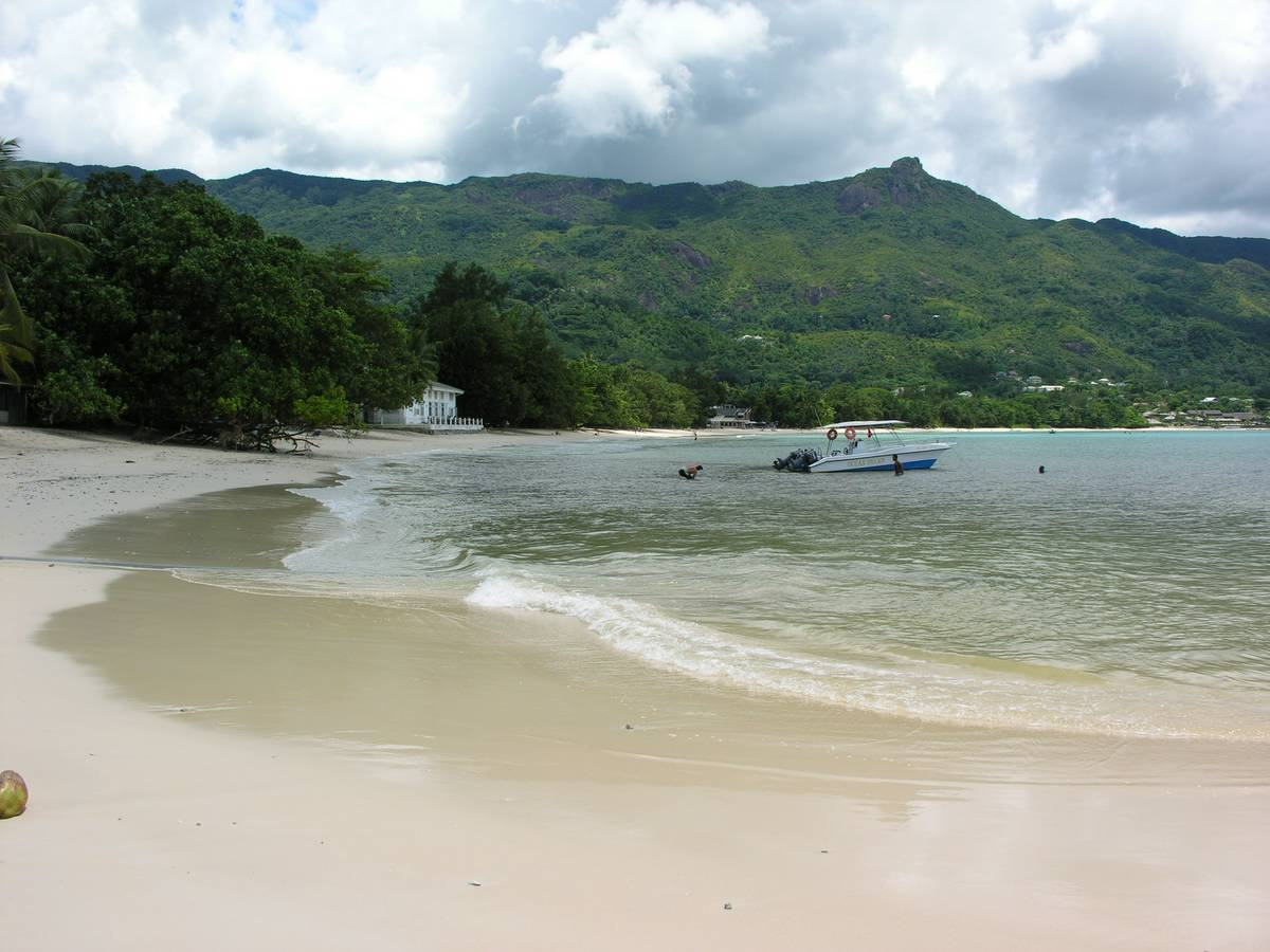 Seychelles, Mahé Island